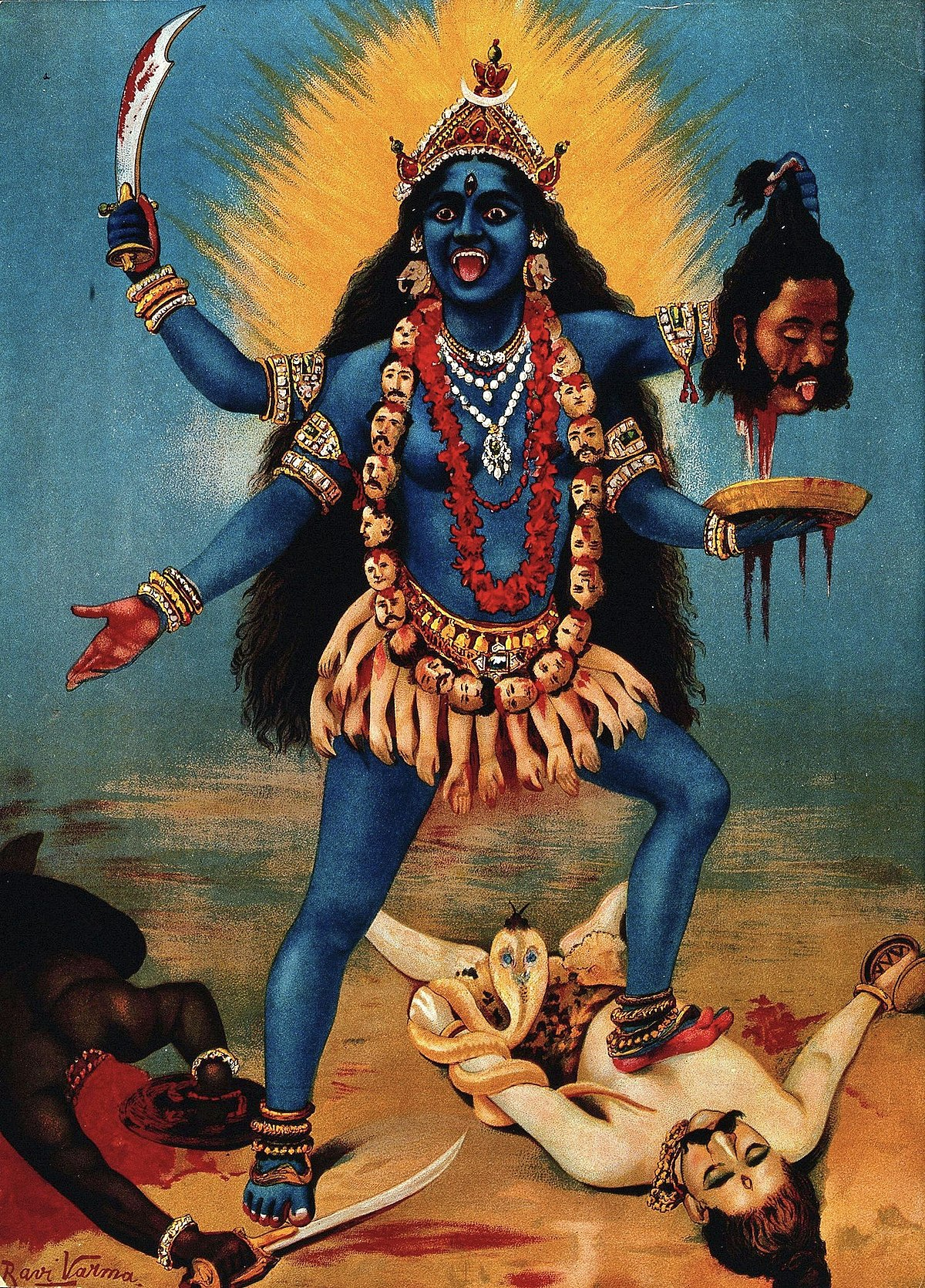 Kali representadora de la destruccion